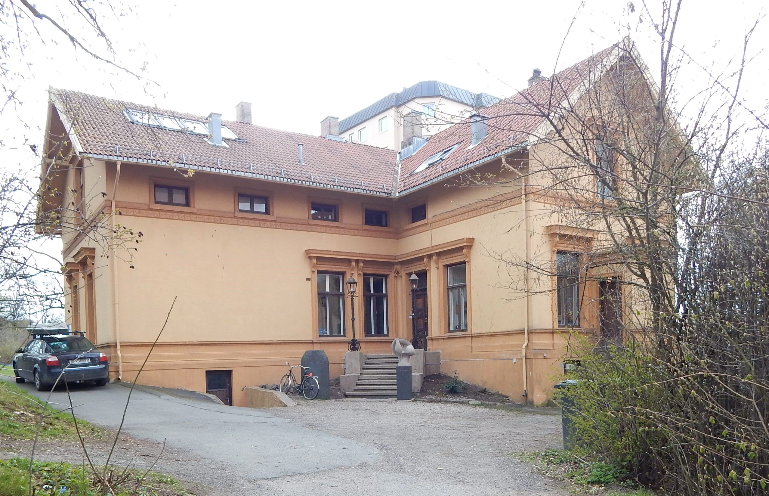 Hekkveien 5, tilholdssted for Norsk Billedhoggerforening